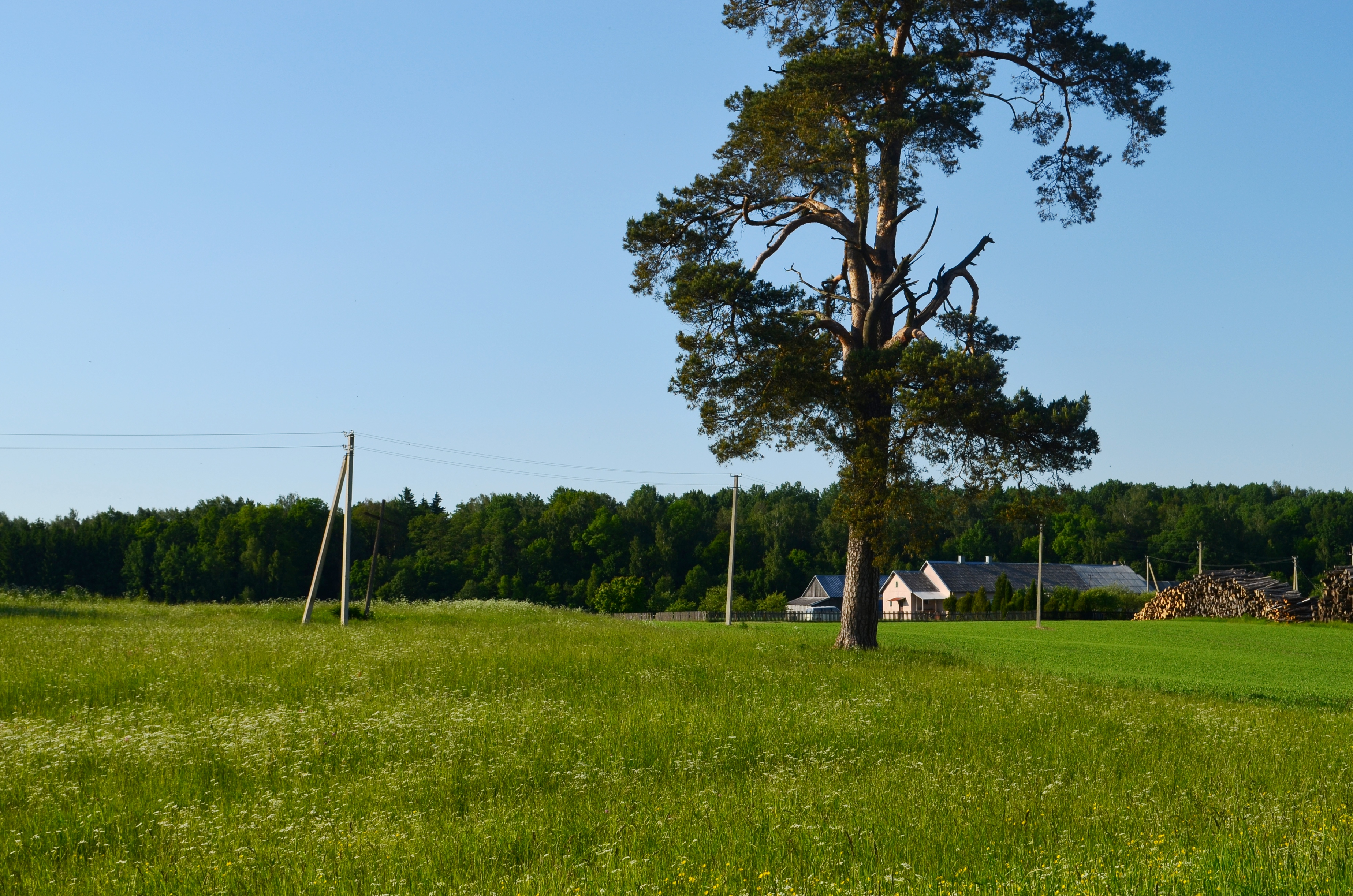 Selverava, Kauno raj.